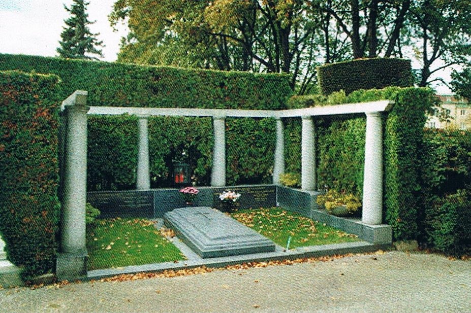 Friedhof Hietzing-Marte Harell